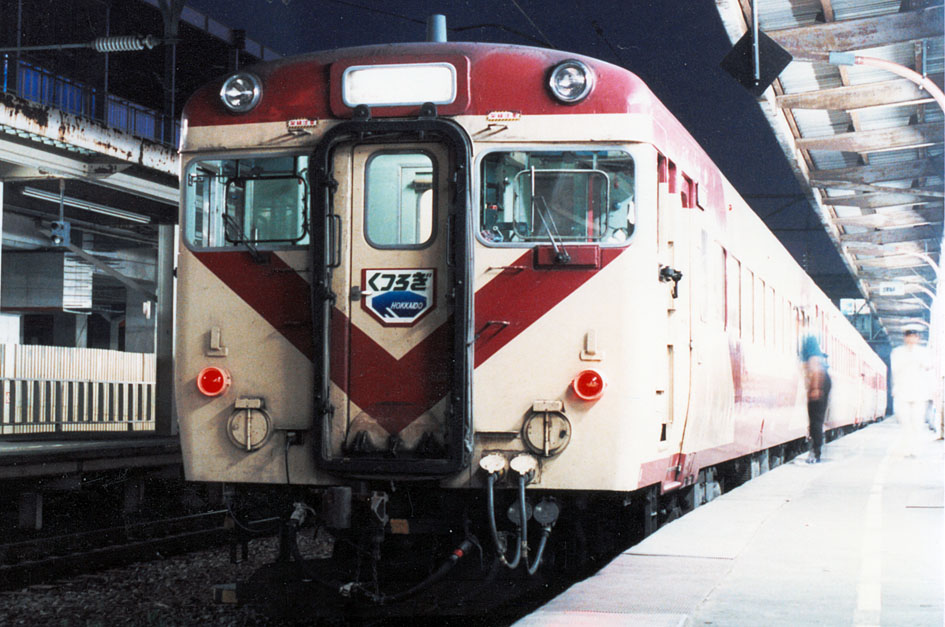 国鉄キロ29 お座敷気動車「くつろぎ」併結の臨時急行「天売」